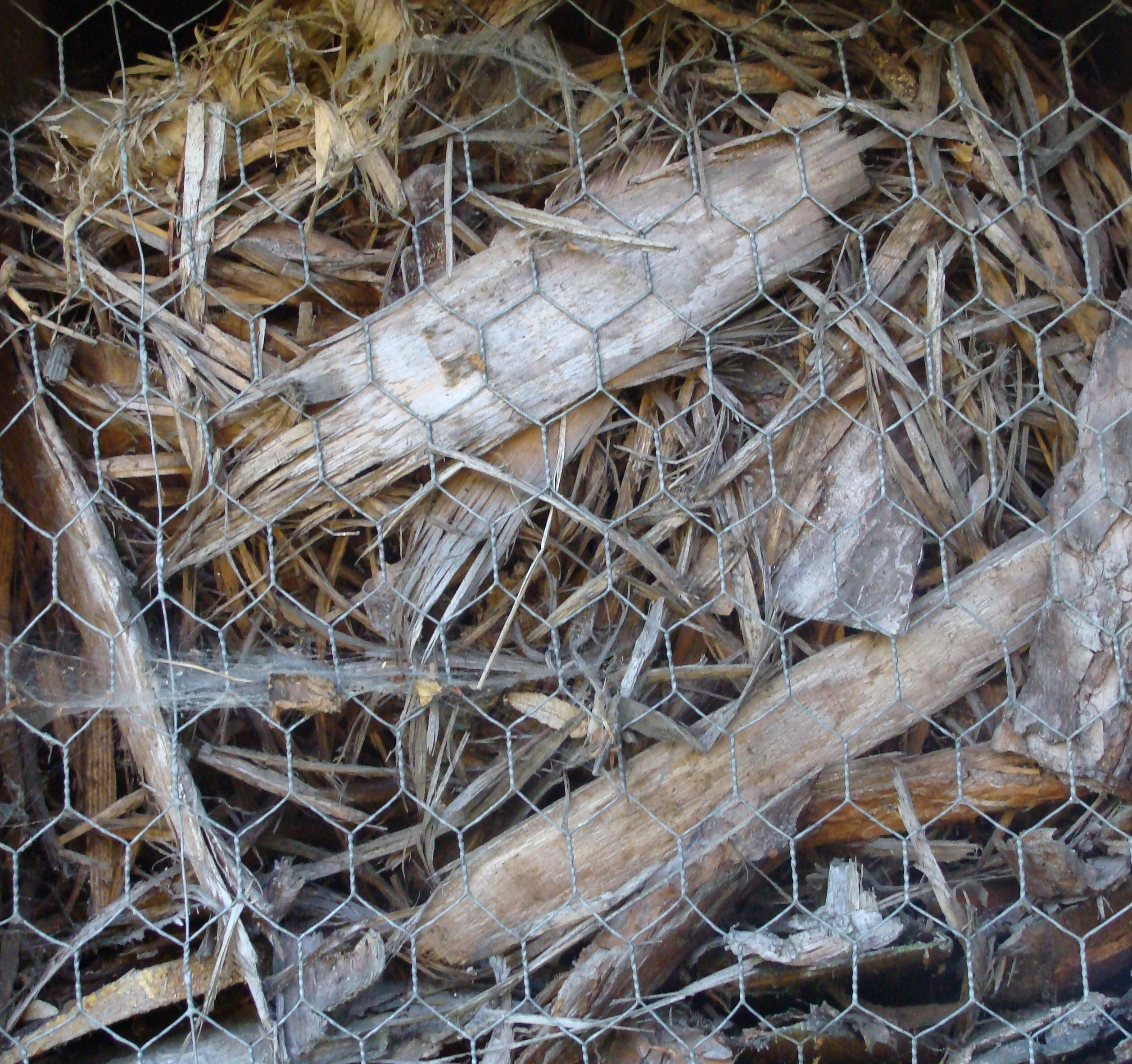 Przykład hibernakulum